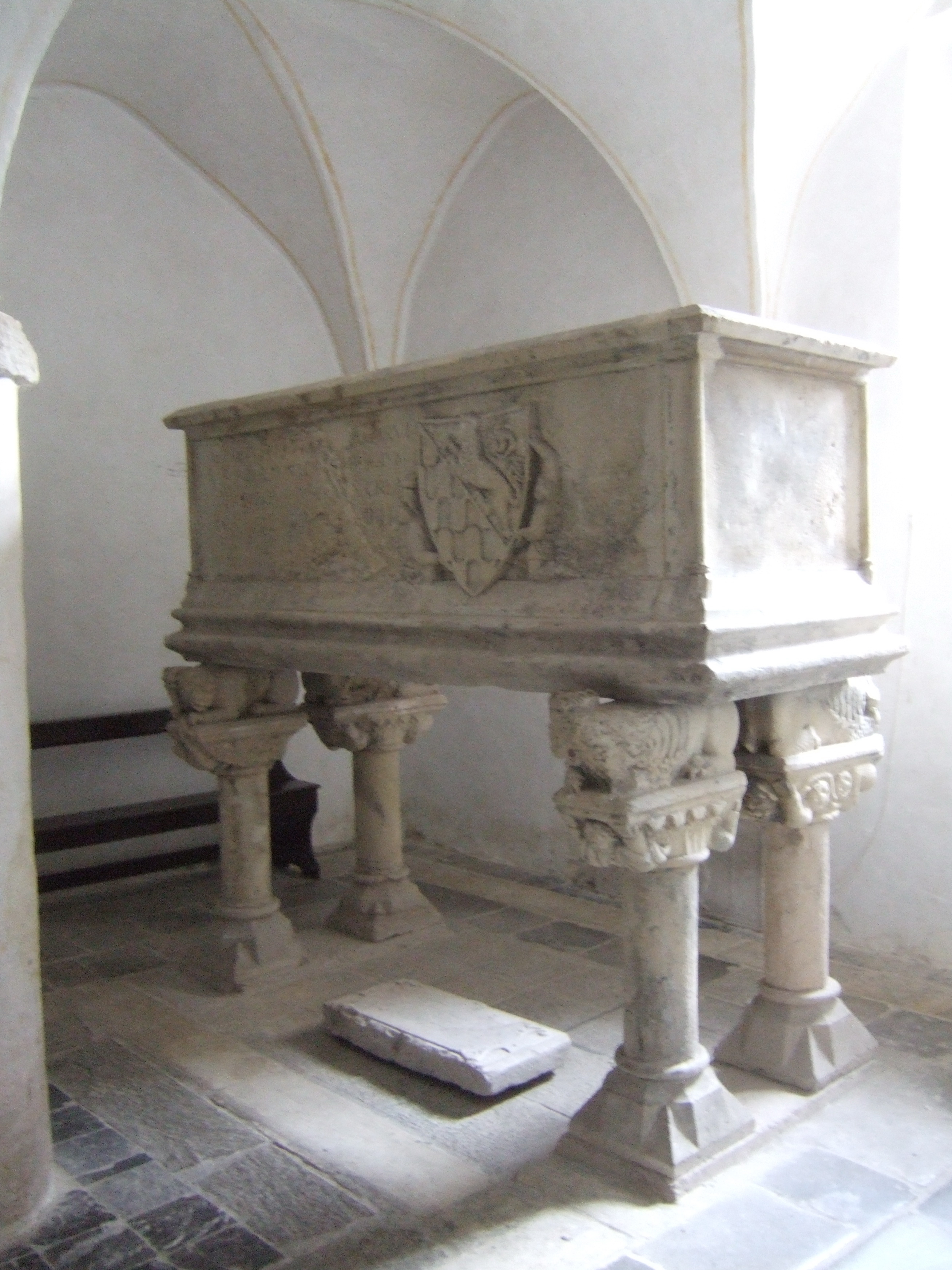 Duomo di Spilimbergo - Cripta - Cappella settentrionale - Arca sepolcrale di Walterpertoldo (1382)